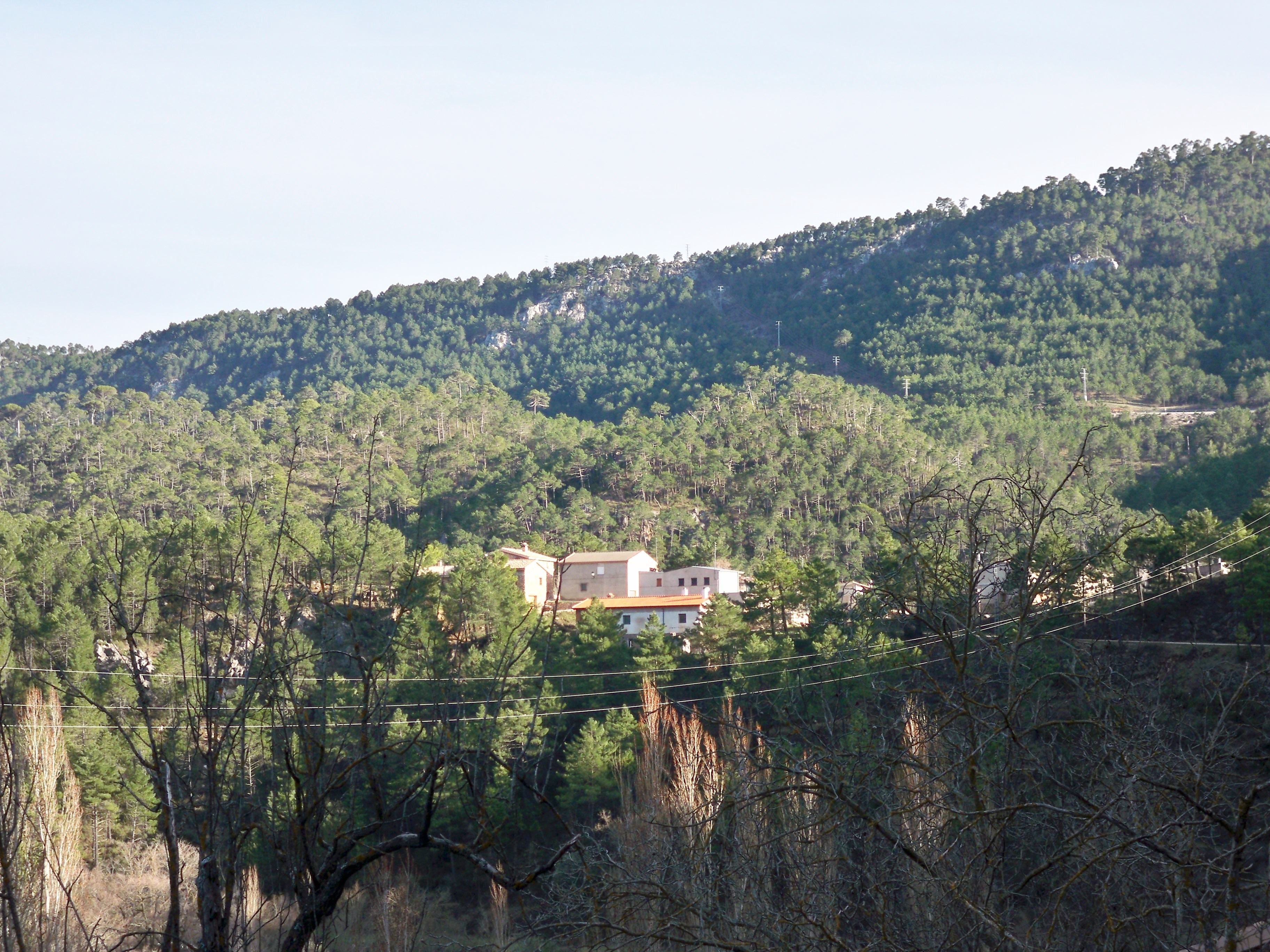 Panorámica de la localidad de El Quejigal (Molinicos - Albacete)